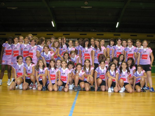 jeunes tfhb